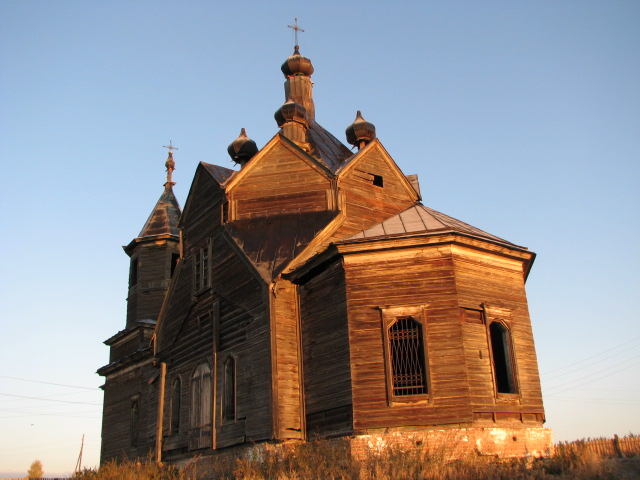 Церковь св. Параскевы в Барабаново, утренний вид с восточной стороны